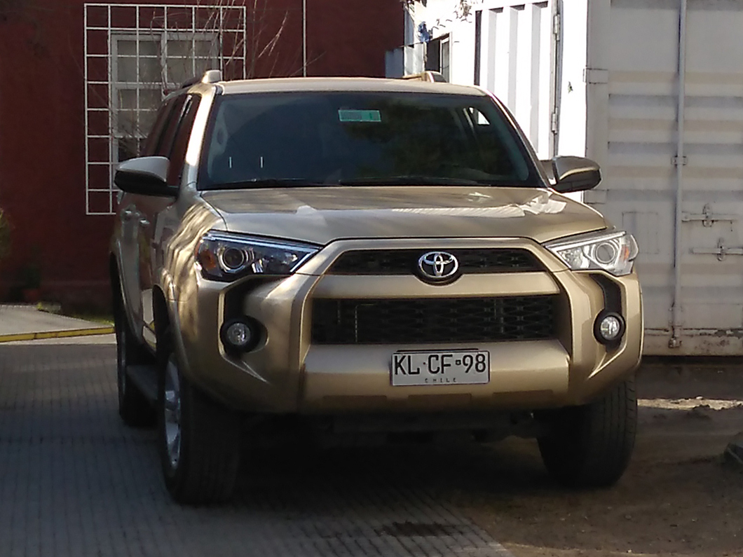 Camioneta Toyota 4Runner, propiedad de la Municipalidad de Maipú, utilizada como medio de transporte de la alcaldesa Cathy Barriga Guerra. En marzo de 2019 generó controversia al difundirse el gasto de $1.428.000 (dinero municipal) para pintar la camioneta de color dorado (beige metallic) por mandato de Barriga. Fotografía tomada en dependencias de la DIPRESEC de Maipú.